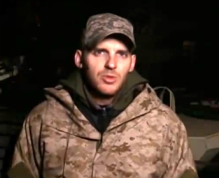 Олексій Середюк — український військовик, командир батальйону (ротного складу) патрульної служби міліції особливого призначення МВС України «Свята Марія».